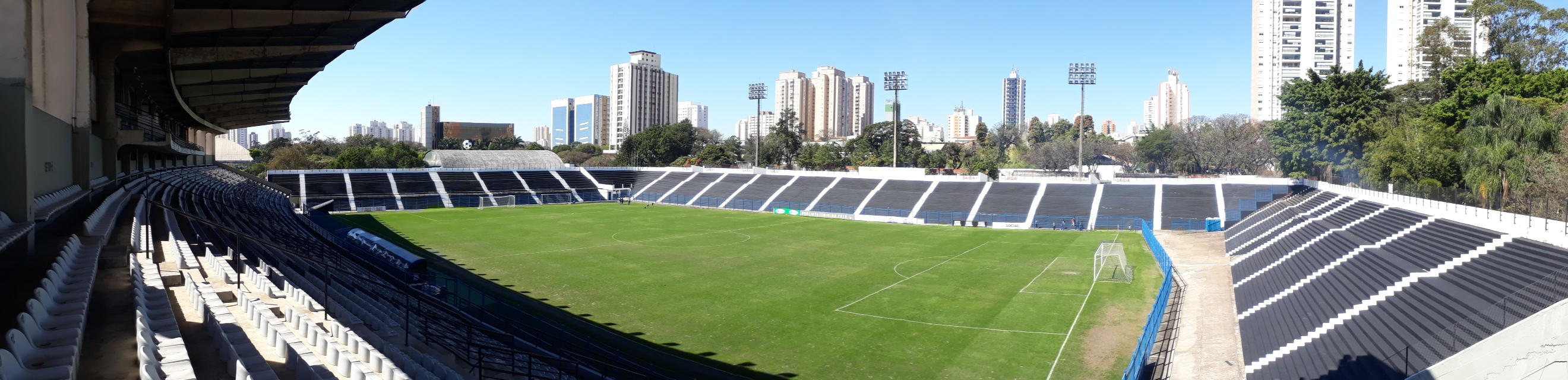 Estádio Alfredo Schürig, localizado no Parque São Jorge, sede social e administrativa do Corinthians